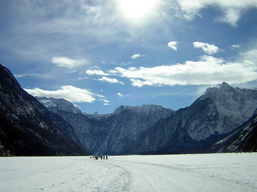 Der zugefrorene Königssee im Februar 2006 Begründung -- Bild soll bei Fotolia verkauft werden